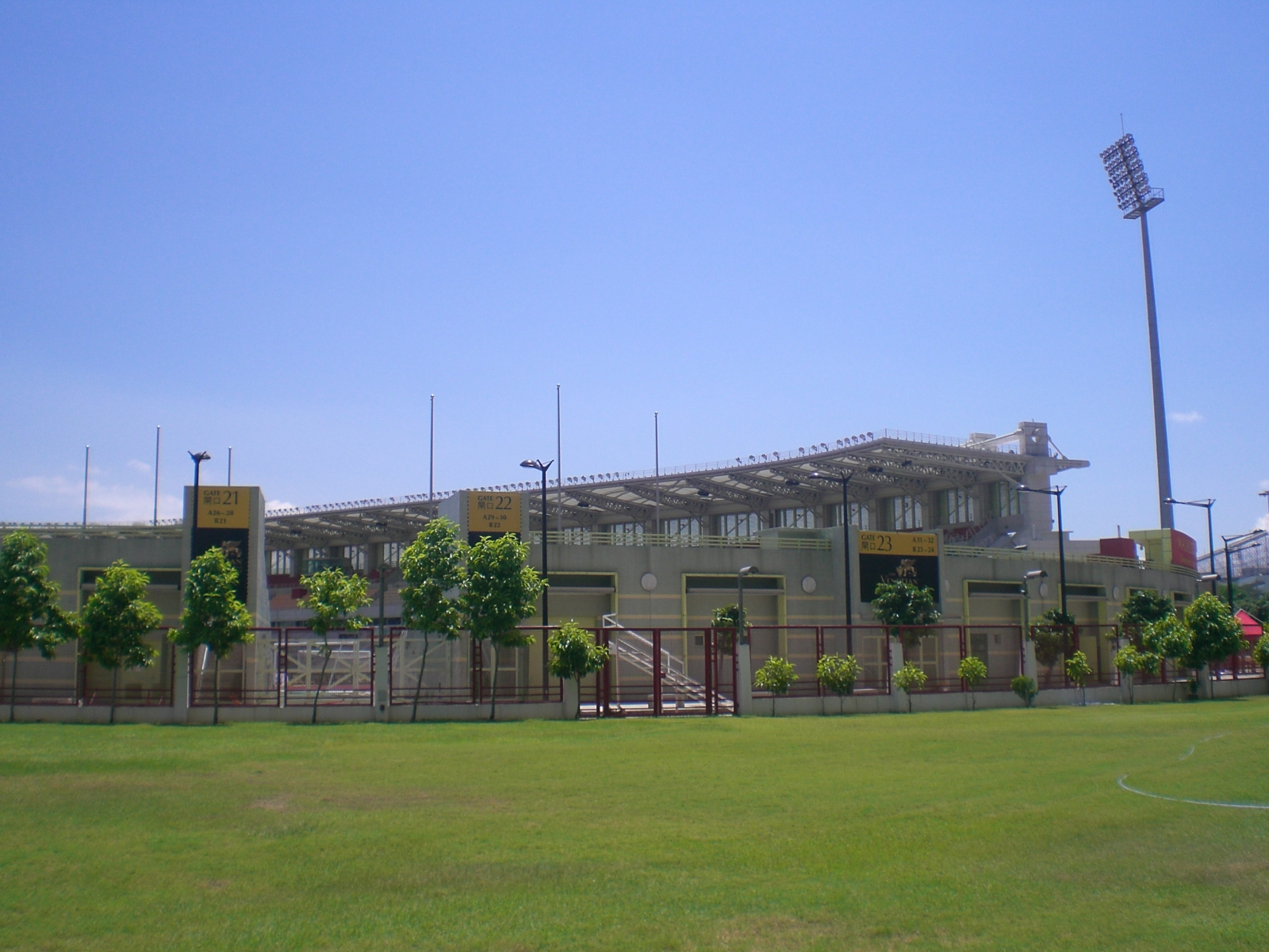 澳門運動場（葡萄牙語:Estádio Campo Desportivo；英語:Macau Stadium）是位於zh:氹仔奧林匹克大馬路的運動場.